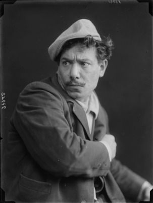 Italian actor Giovanni Grasso (1873-1930)